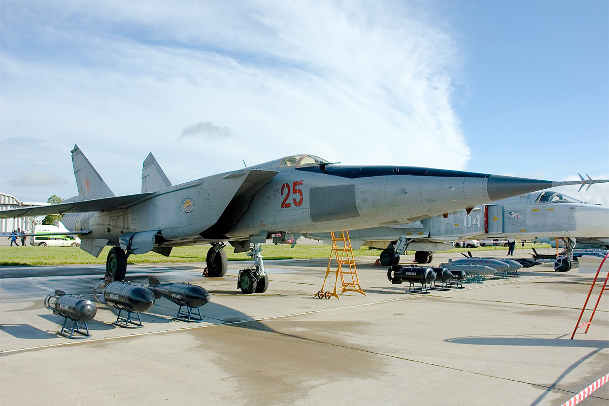 MiG-25RBSch „Foxbat-D“